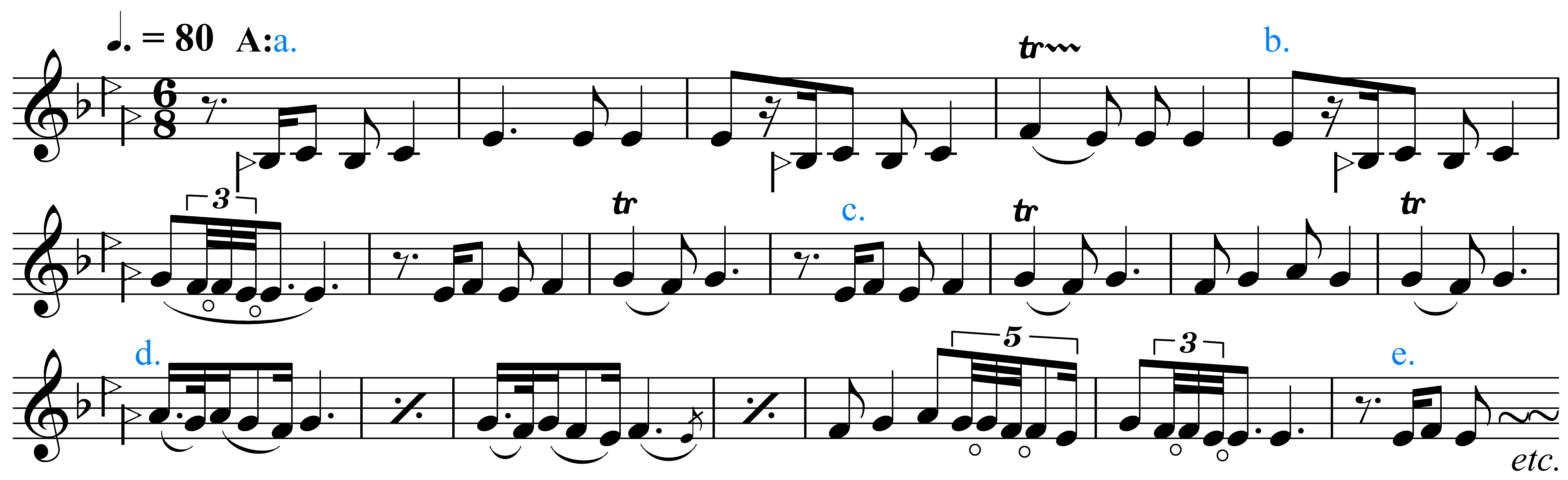 رنگ دلگشا از ردیف موسی معروفی در دستگاه سه‌گاه می کُرُن